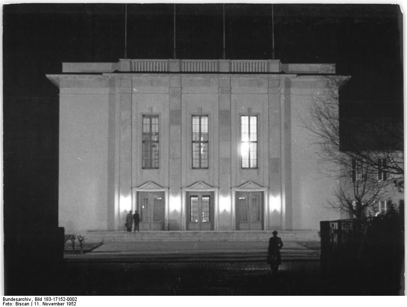 Zentralbild-Biscan Kno-Ho. 11.11.1952 Magdeburg bei Nacht Der Ernst-Thälmann-Kulturpalast, das Kulturhaus der Magdeburger SAG-Betriebe.